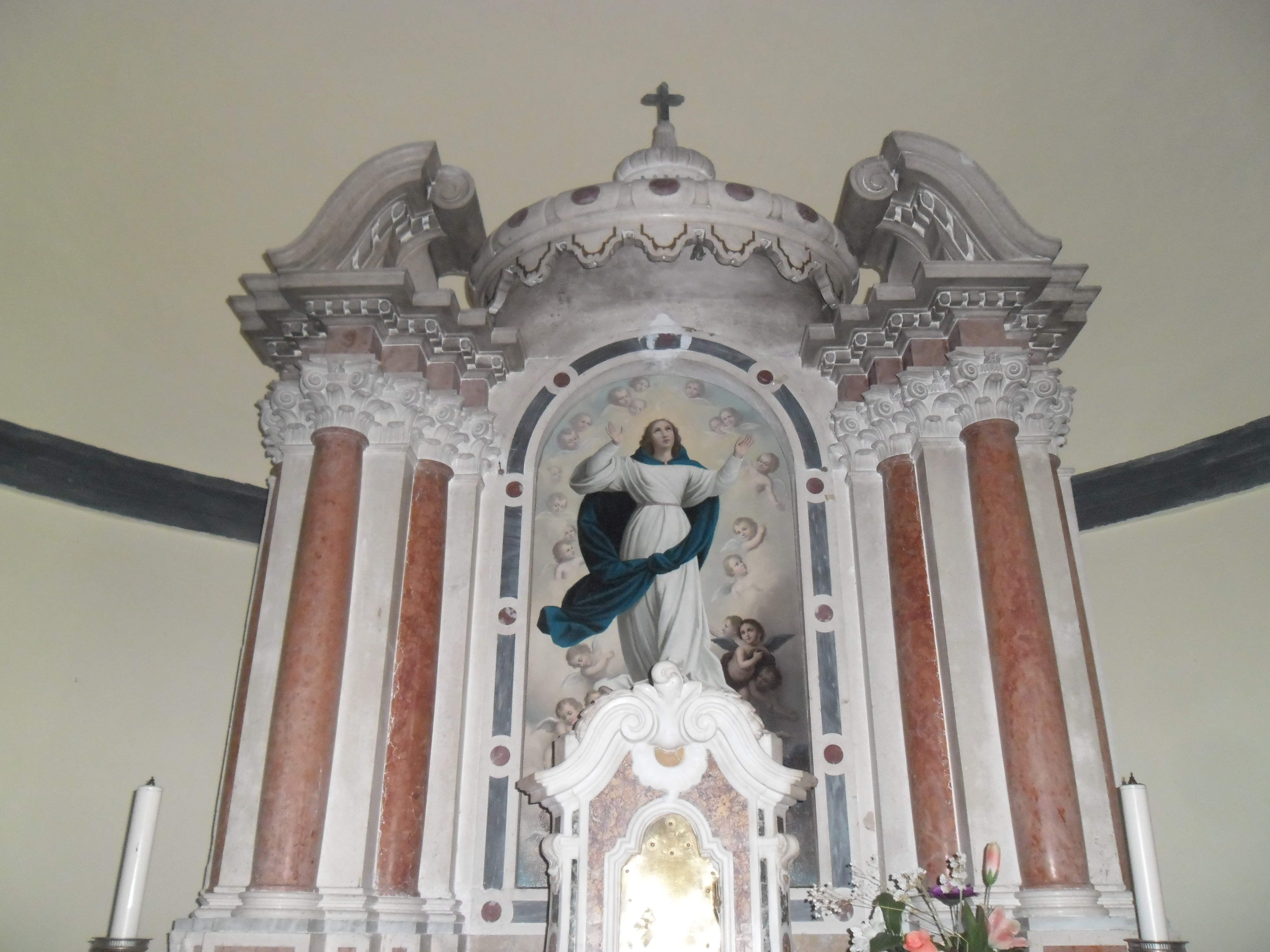 Rožat u Rijeci dubrovačkoj